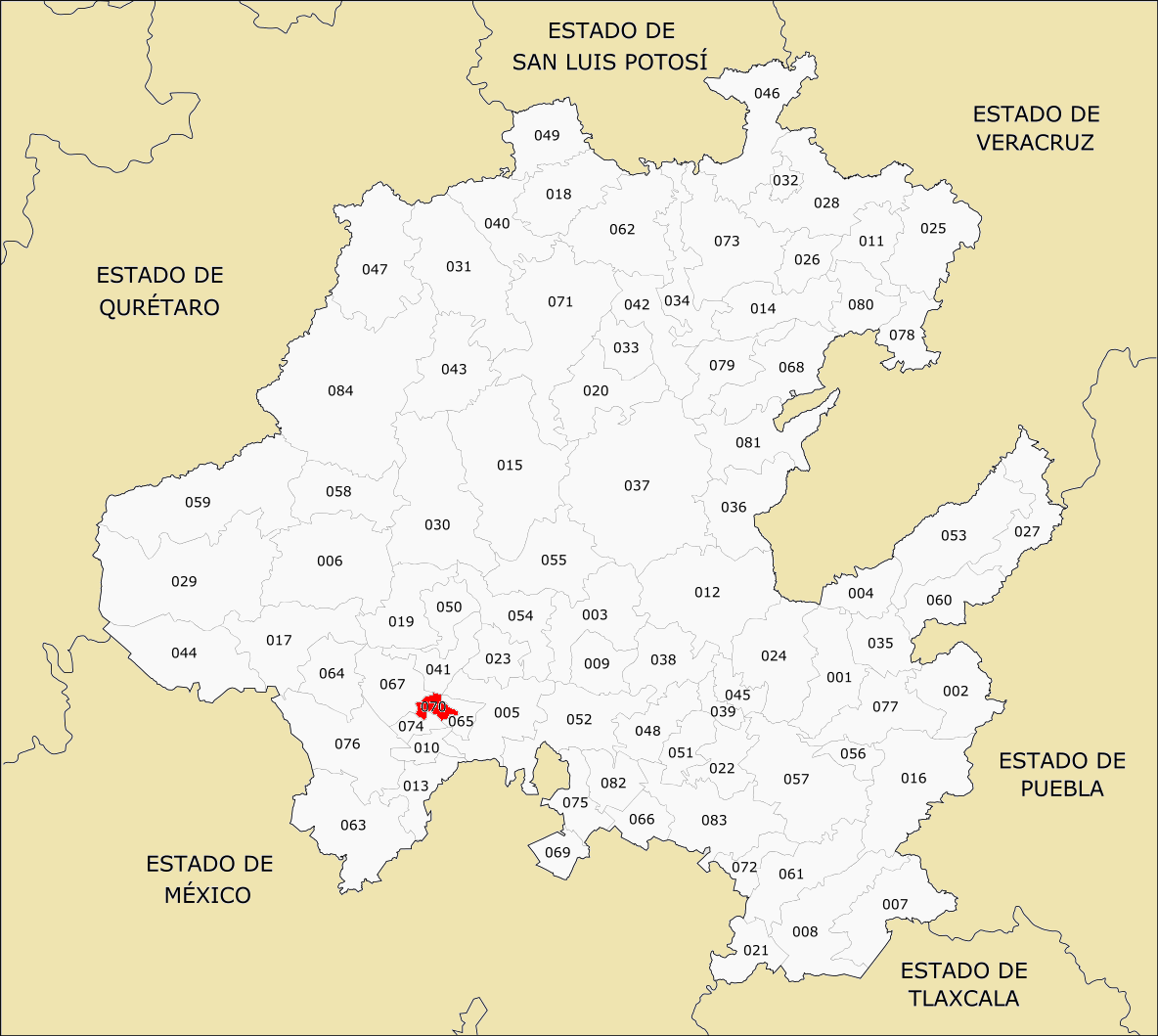 Municipios de Hidalgo